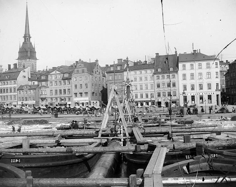 Dragning av vattenledning vid Kornhamntorg, Stockholm